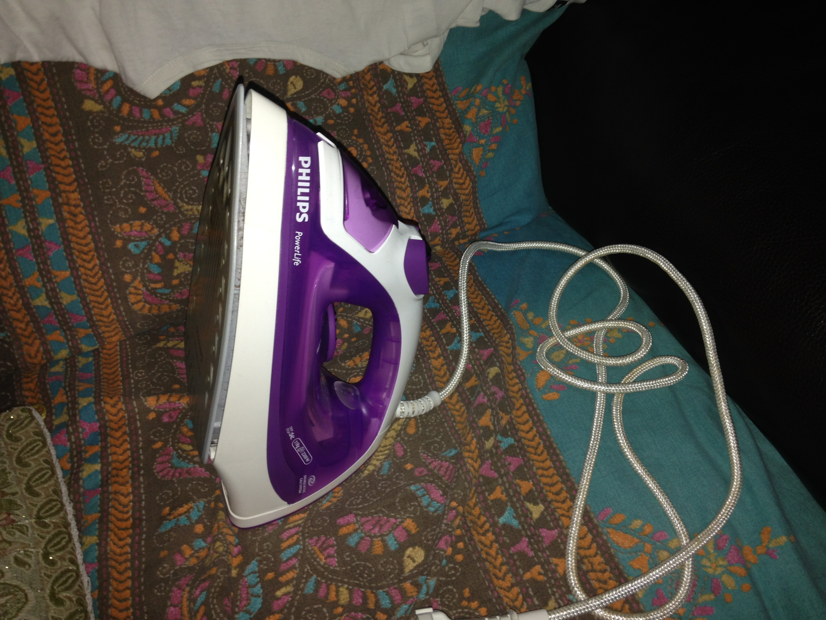 Ferro da stiro Philips a casa mia.